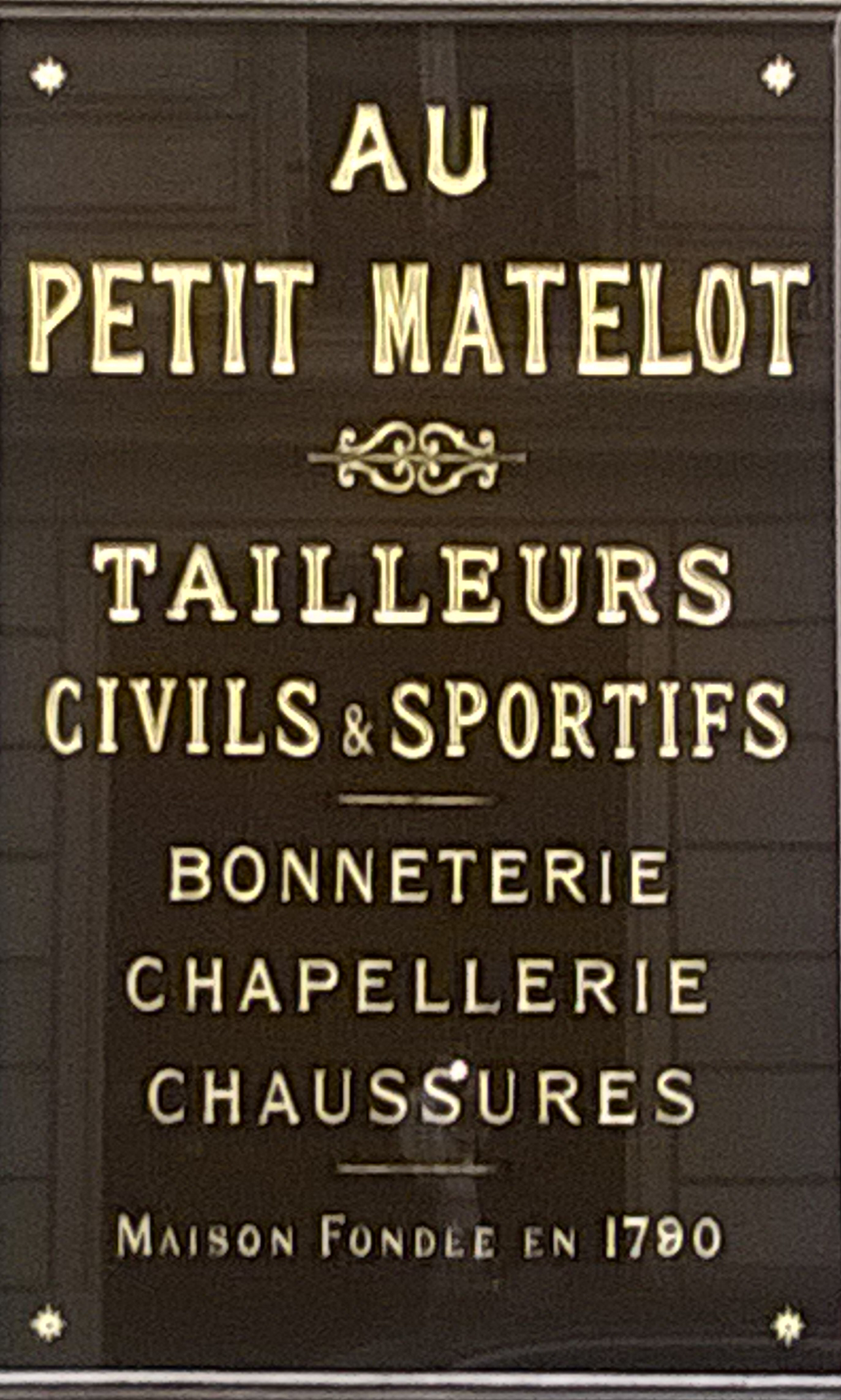 plaque murale rue d'Argentine au coin de l'avenue de la grande armée à Paris : magasin "au petit matelot" fondé en 1790